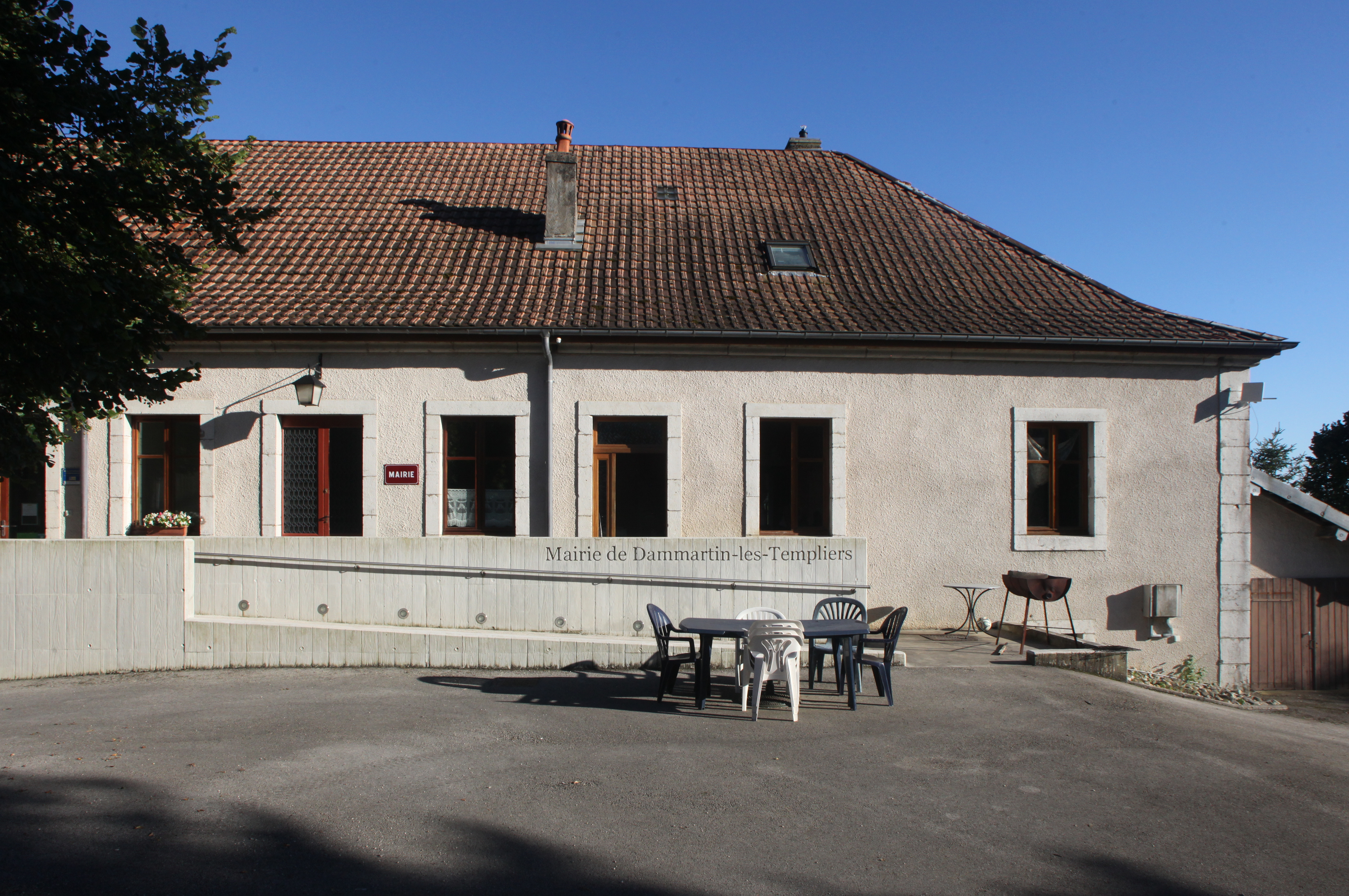 Mairie de Dammartin-les-Templiers (Doubs).